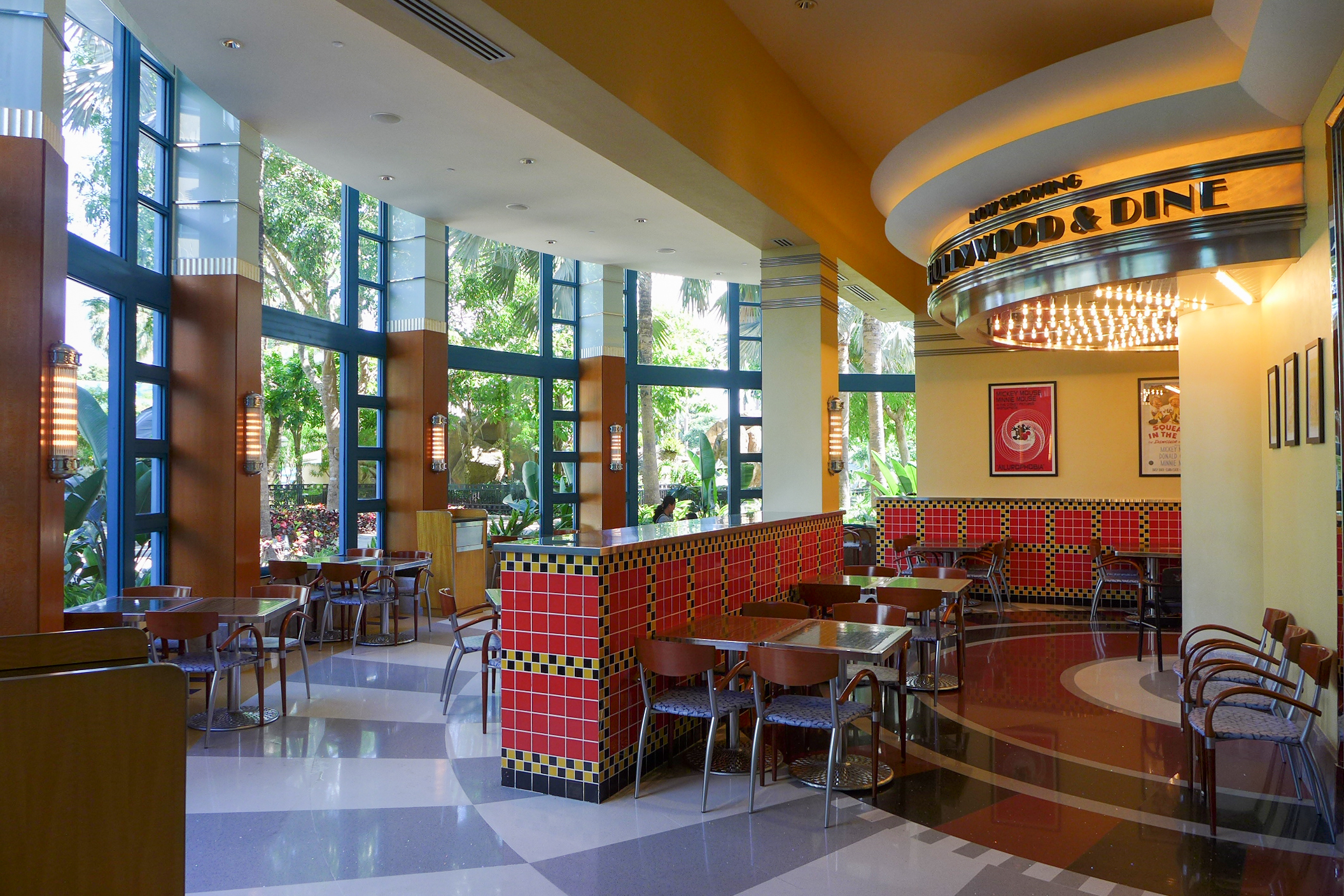 Disneyland Hollywood Hotel Hollywood & Dine